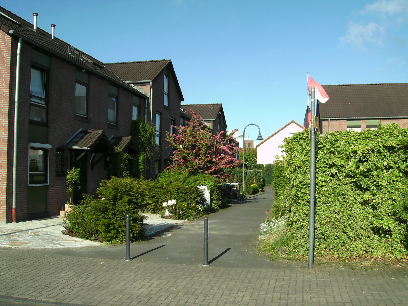 Reihenhäuser Blumenberg